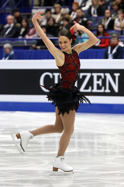 Шотландская фигуристка Наташа Маккей, представляющая Великобританию. Чемпионат Европы по фигурному катанию 2017.